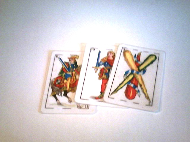 Una mano de truco: el envido más bajo posible (20 puntos).